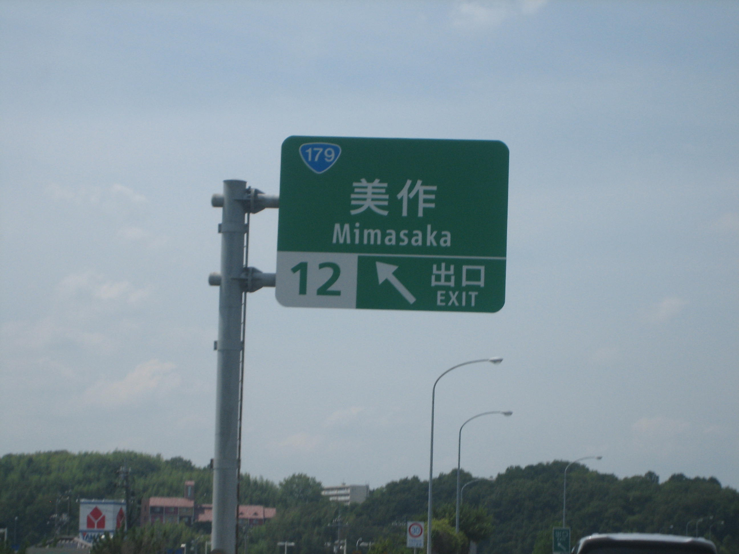 美作IC出口